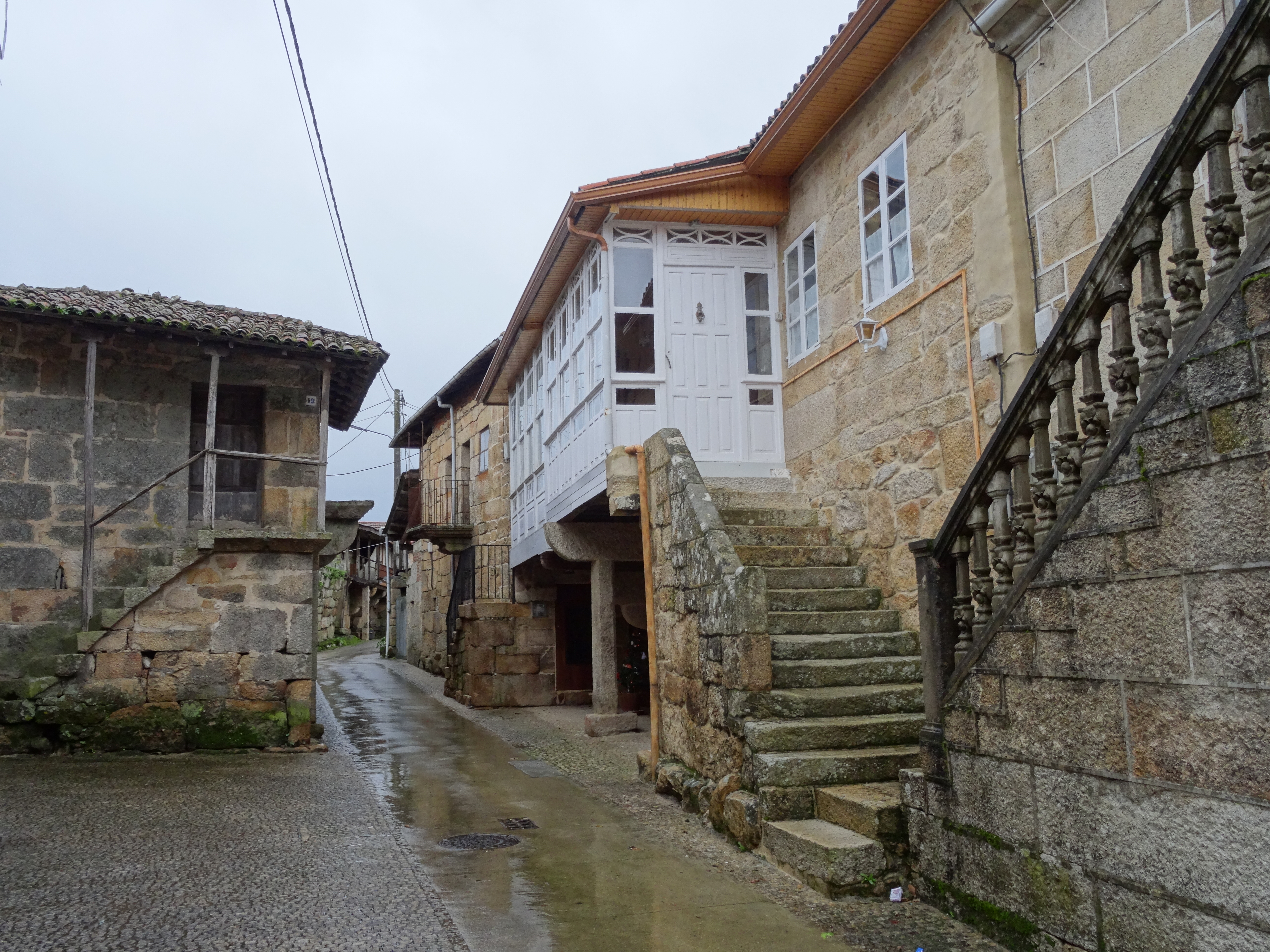 Ver título.